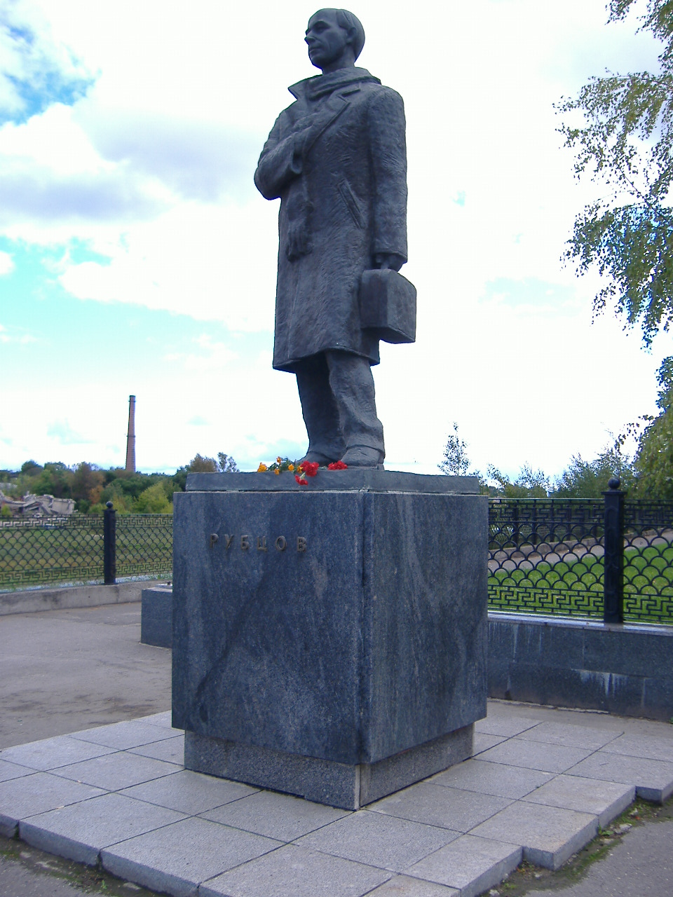 Statue des russischen Dichters Nikolai Rubzow in Wologda